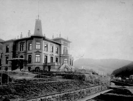 s.o.